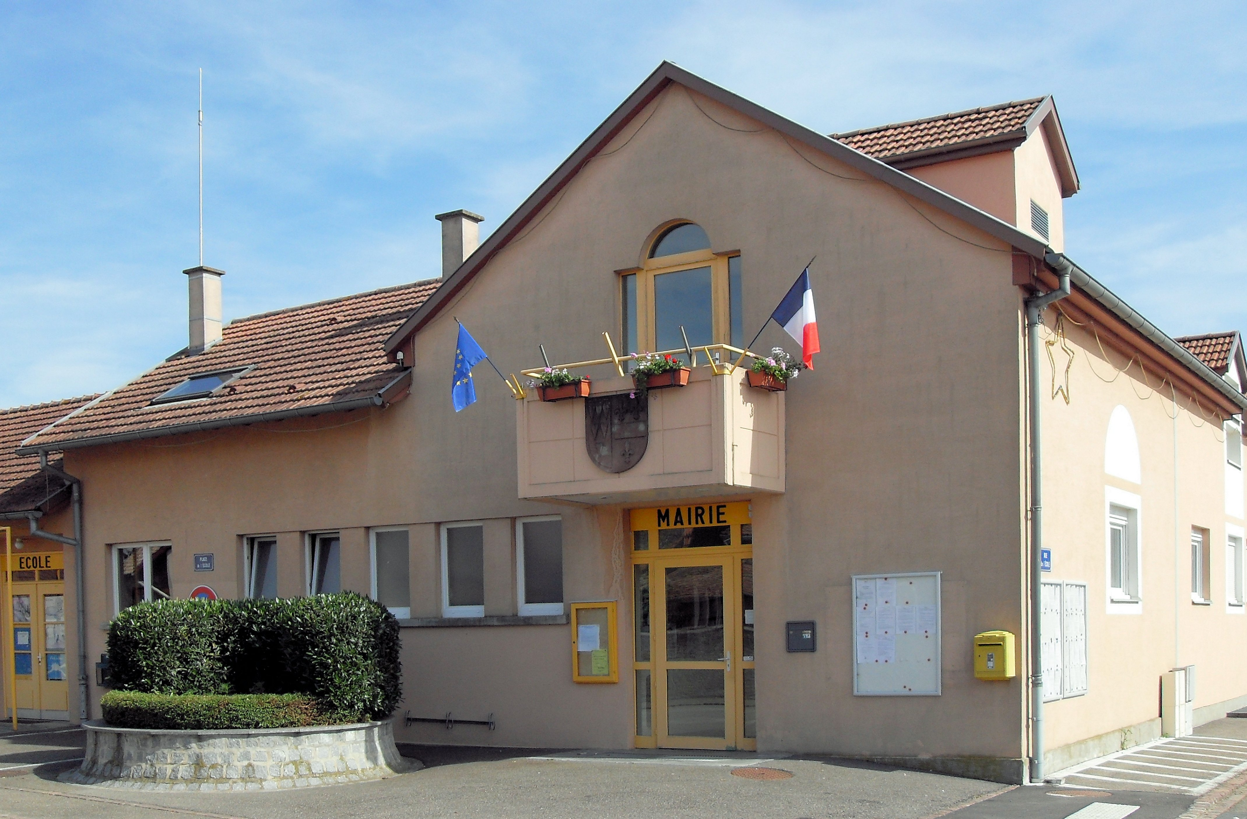 La mairie de Biltzheim